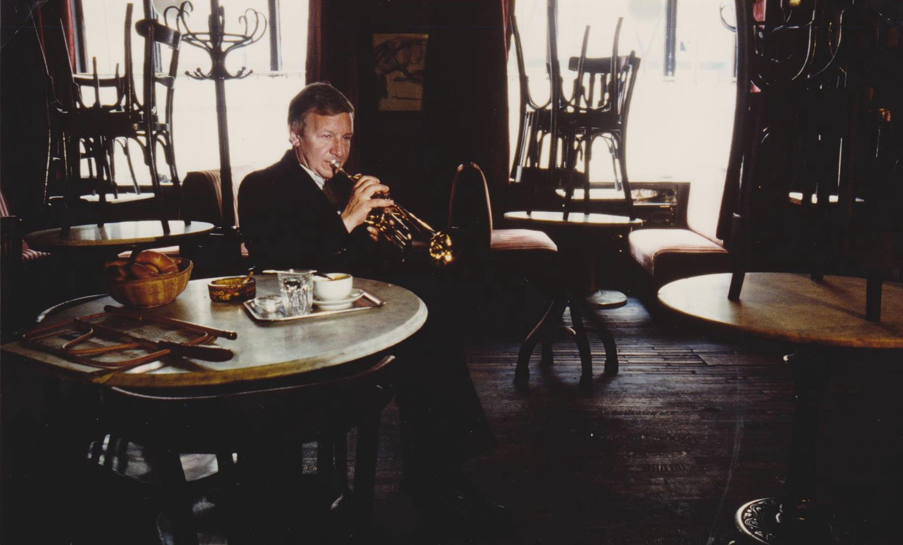 Robert Politzer posierend mit Trompete in einem Wiener Café.